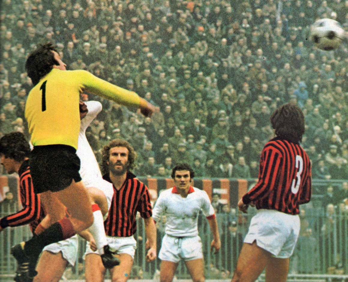 Milano, stadio San Siro. 12 gennaio 1975. Il portiere milanista Enrico Albertosi effettua un'uscita di pugno nel corso della sfida tra Milan e Varese (4-0) valevole per la 13ª giornata del campionato italiano di Serie A 1974-75; osservano l'azione il compagno di squadra Luciano Zecchini e il varesino Walter De Vecchi.